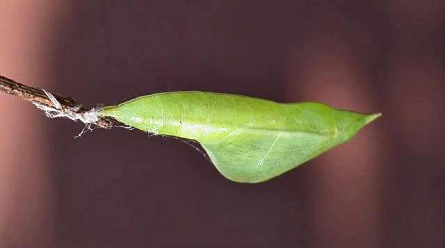 Eurema hecabe, pupa